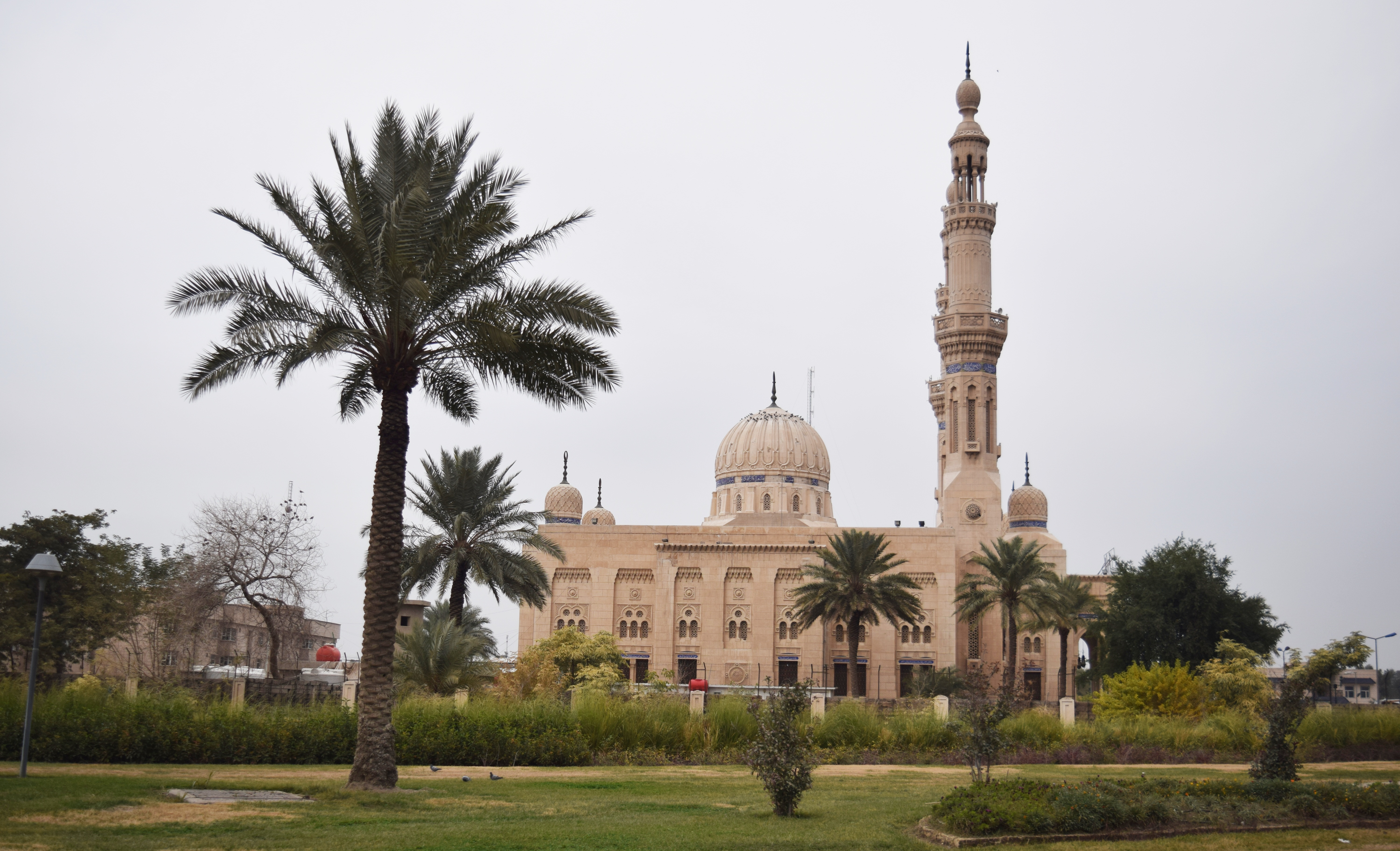 صورة لجامع ام الطبول من شارع المطار، بغداد، العراق